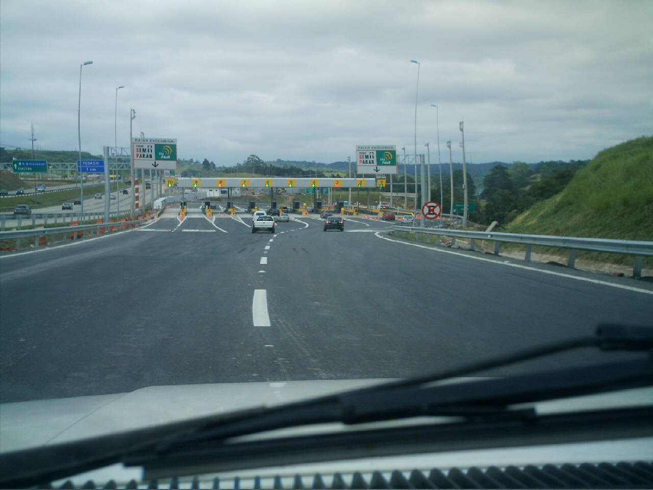 Rodoanel Mário Covas